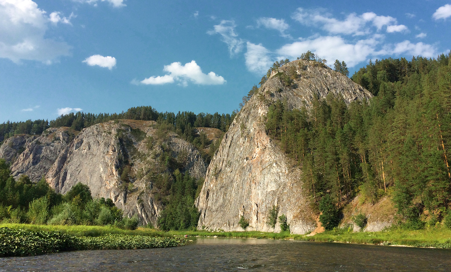 Башкирский государственный природный заповедник: Старосубхангулово, Бурзянский район, Башкортостан This image is related to the protected area of Russia number 0200099